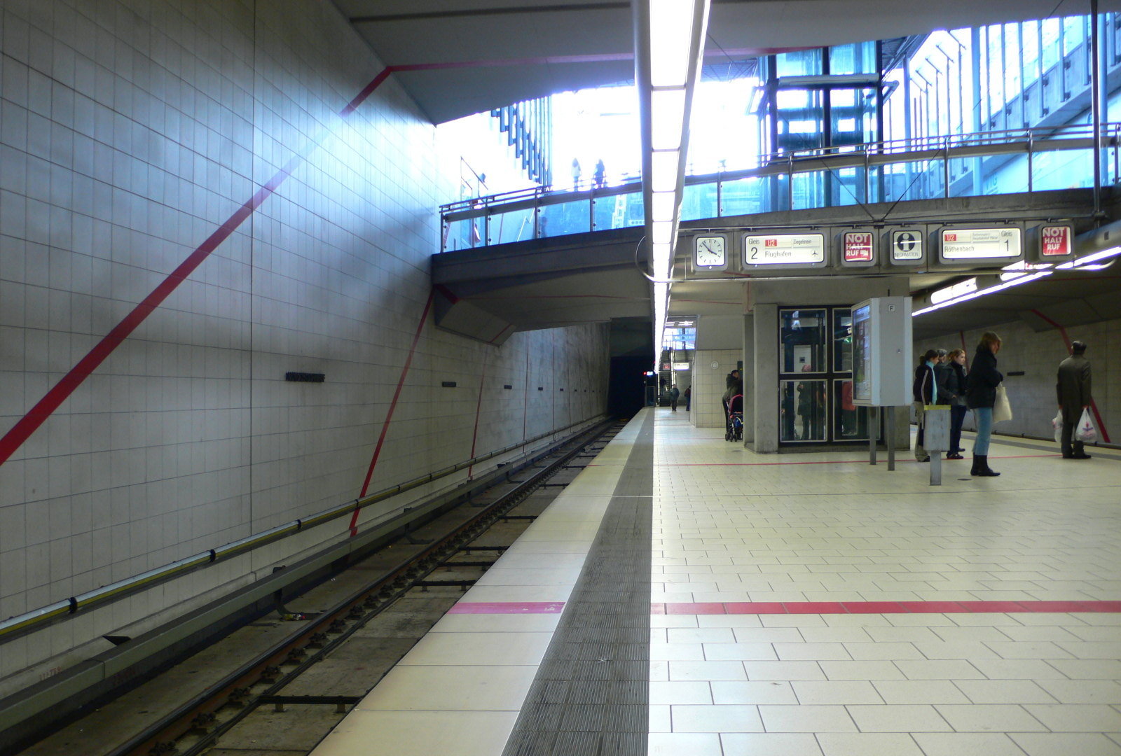 U-Bahnhof Nordostbahnhof der U-Bahn Nürnberg, Bahnsteigebene, Blick von Norden